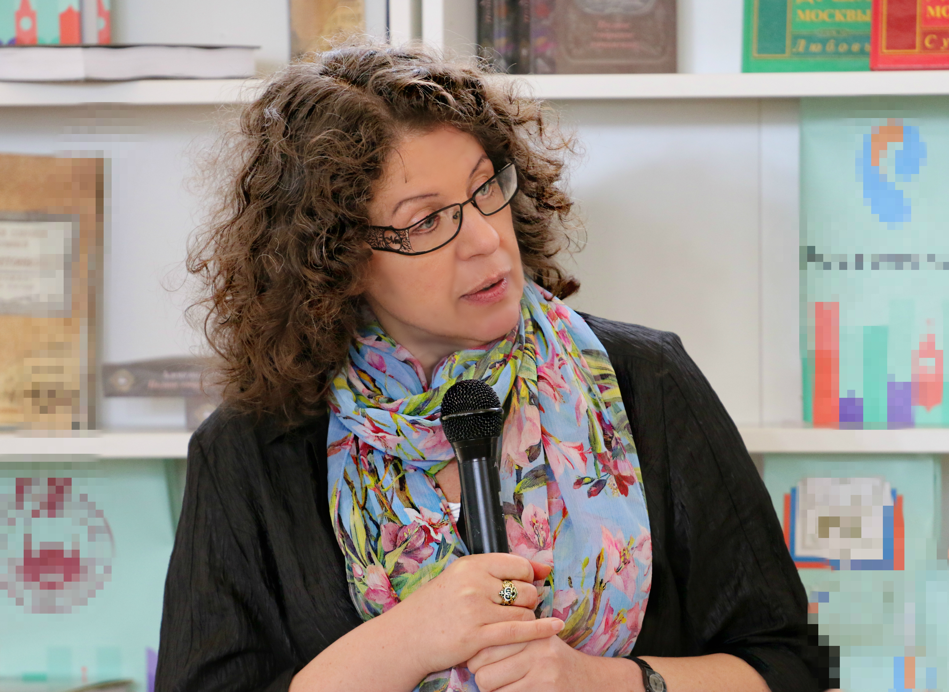 Александра Маринина- российский писатель, автор детективов. На книжном фестивале "Красная площадь".